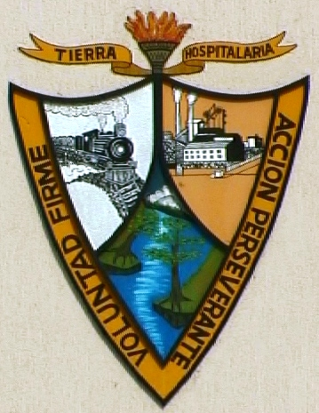 Escudo de la Ciudad de Sabinas, Coahuila; Mexico